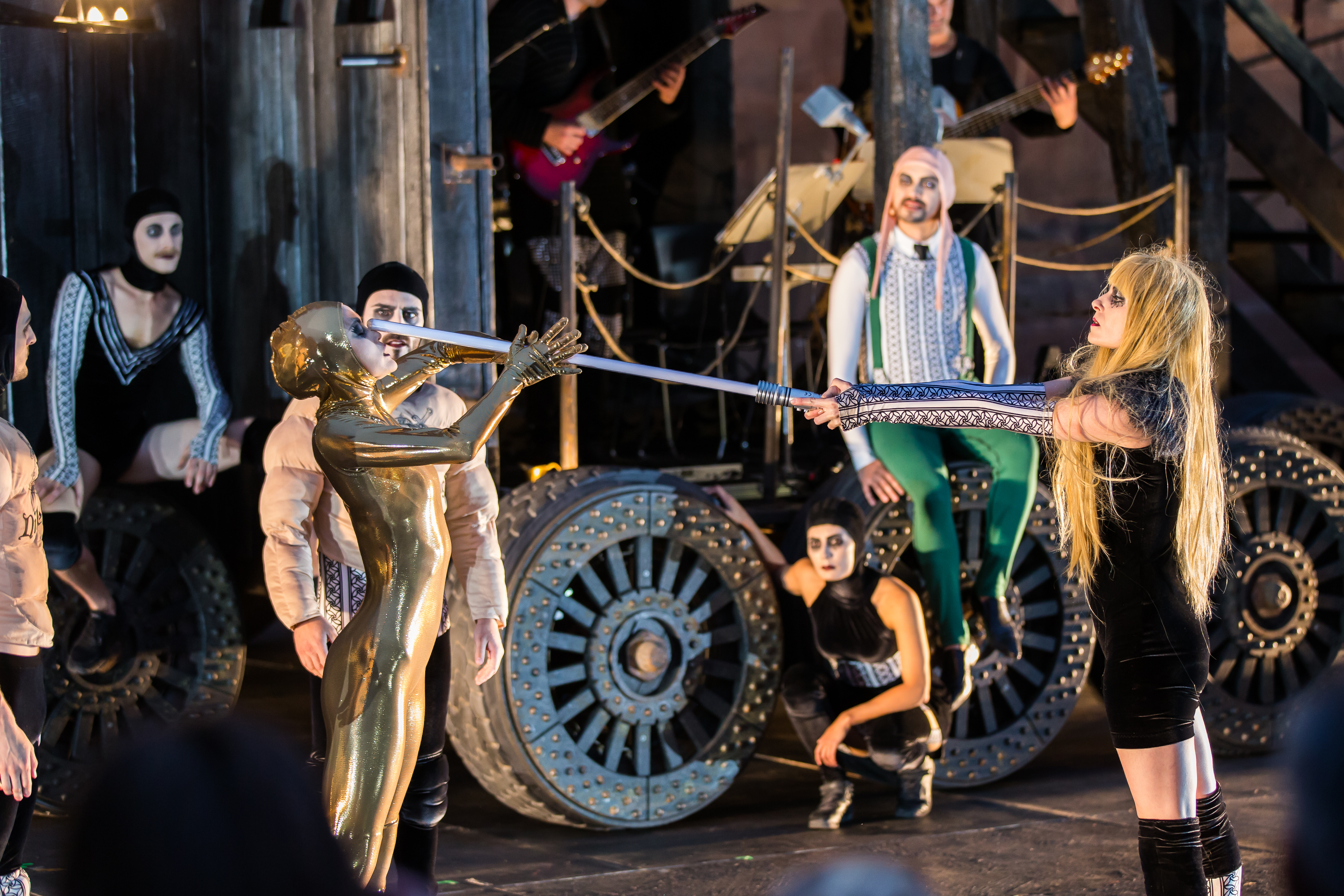 Nibelungenfestspiele Worms Gemetzel 2015 Nordseite Wormser Kaiserdom Nico Hofmann (Intendant), Albert Ostermaier (Autor), Thomas Schadt (Regisseuer) Enemble: Alina Levshin (Ortlieb), Maik Solbach (Narr), Judith Rosmair (Kriemhild), Catrin Striebeck (Brünhild), Markus Boysen (Etzel), Heiko Pinkowski (Dietrich), Max Urlacher (Hagen), Holger Kunkel (Gunter), Gabriel Raab (Gernot), Peter Becker (Giselher), Tom Radisch (Volker), Marion Breckwoldt (Zofe), Radu Cojocariu (Erzähler)